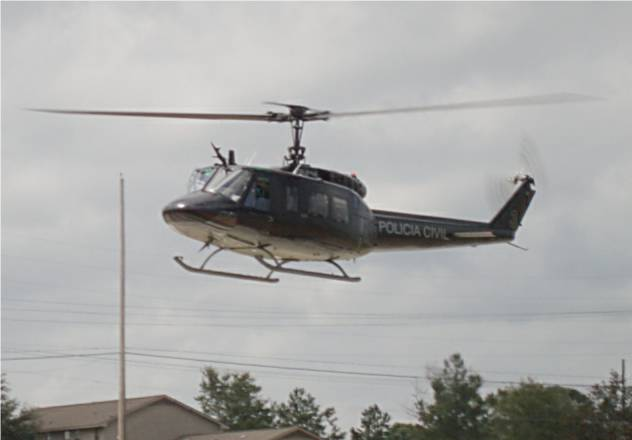 police helicopter - Brazil